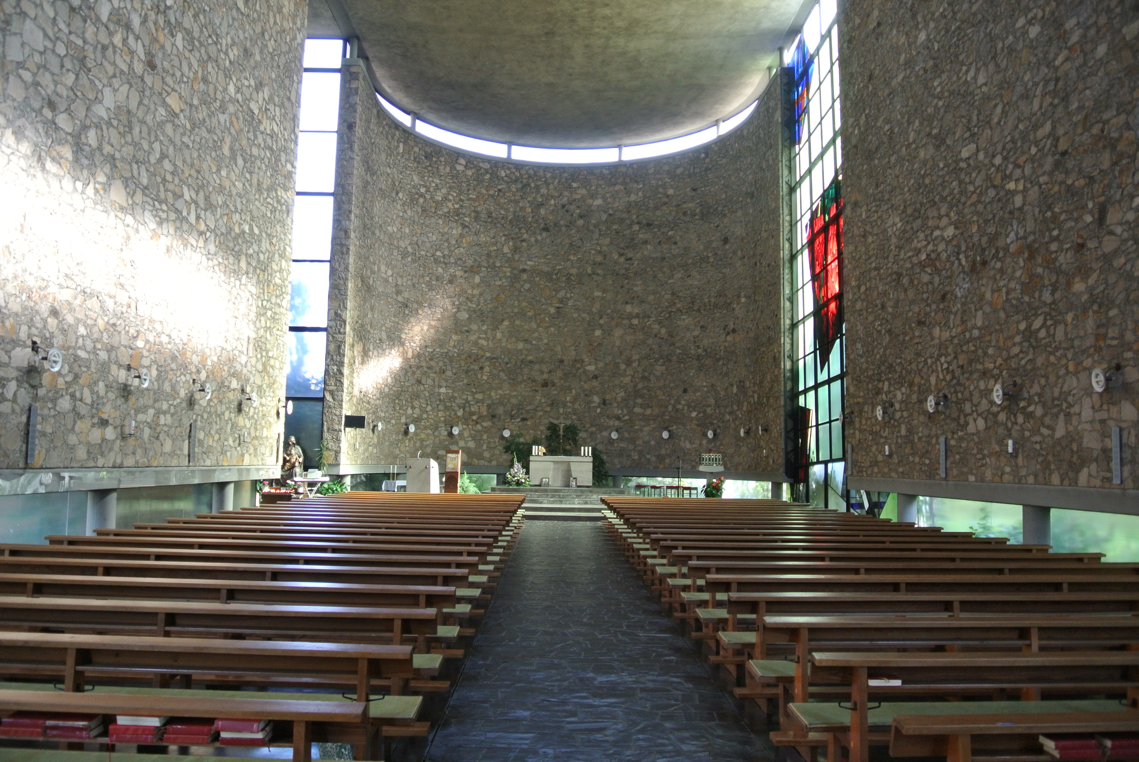 St. Wendel Kirche, Innenraum, Blick zum Altar, Architekt Johannes Krahn, Baujahr 1957